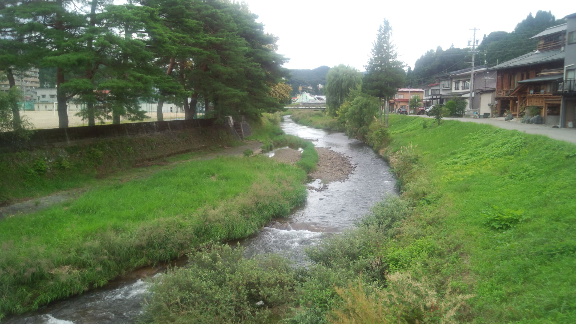 白線流しの舞台になっている大八賀川（斐太高等学校前）